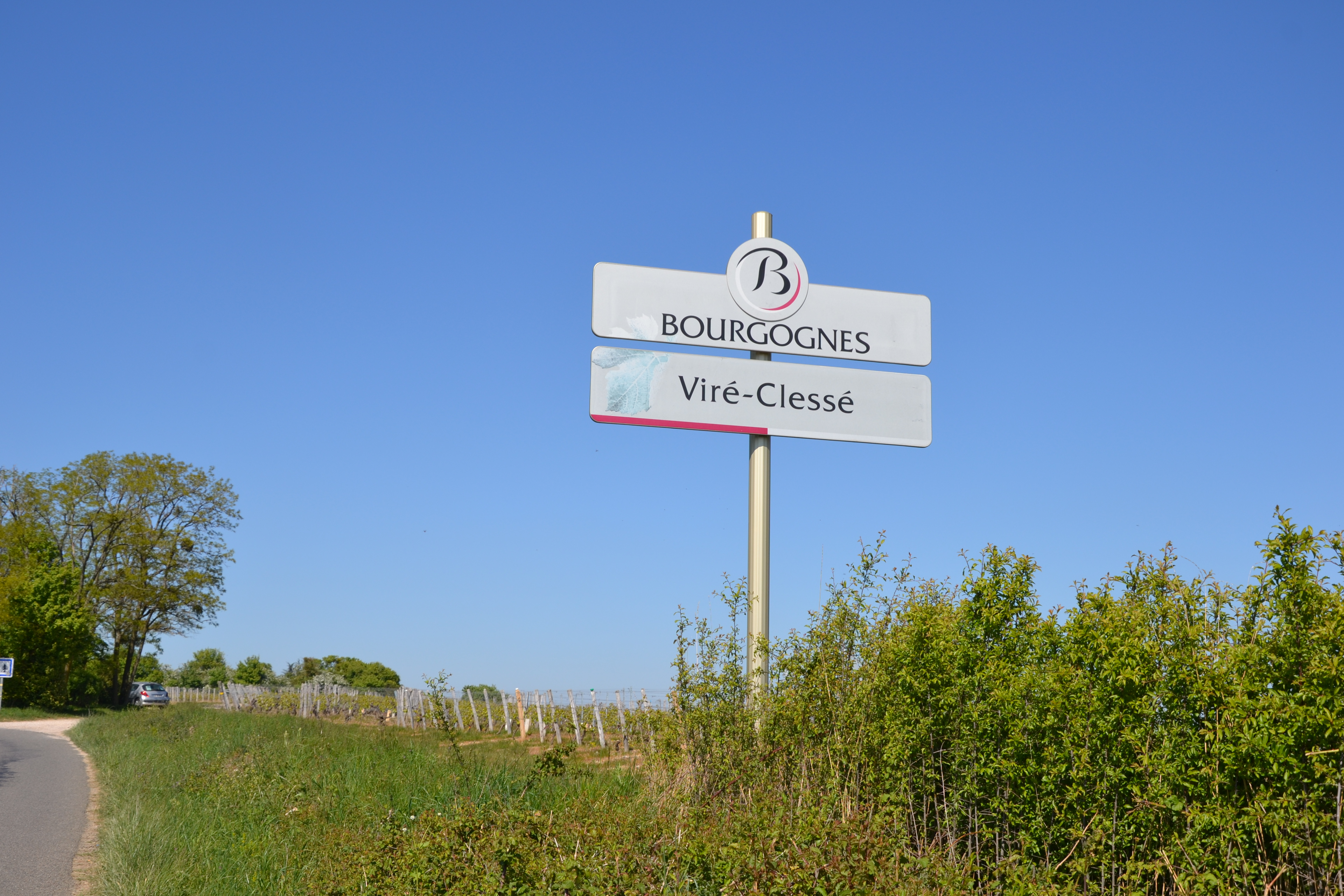 Vignoble de l'AOC Viré-clessé, à Clessé (71) : route des vins